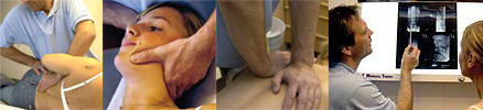 Manuellterapi, rygg, manipulasjon, isjias, røntgen, nakke, muskel og skjelett